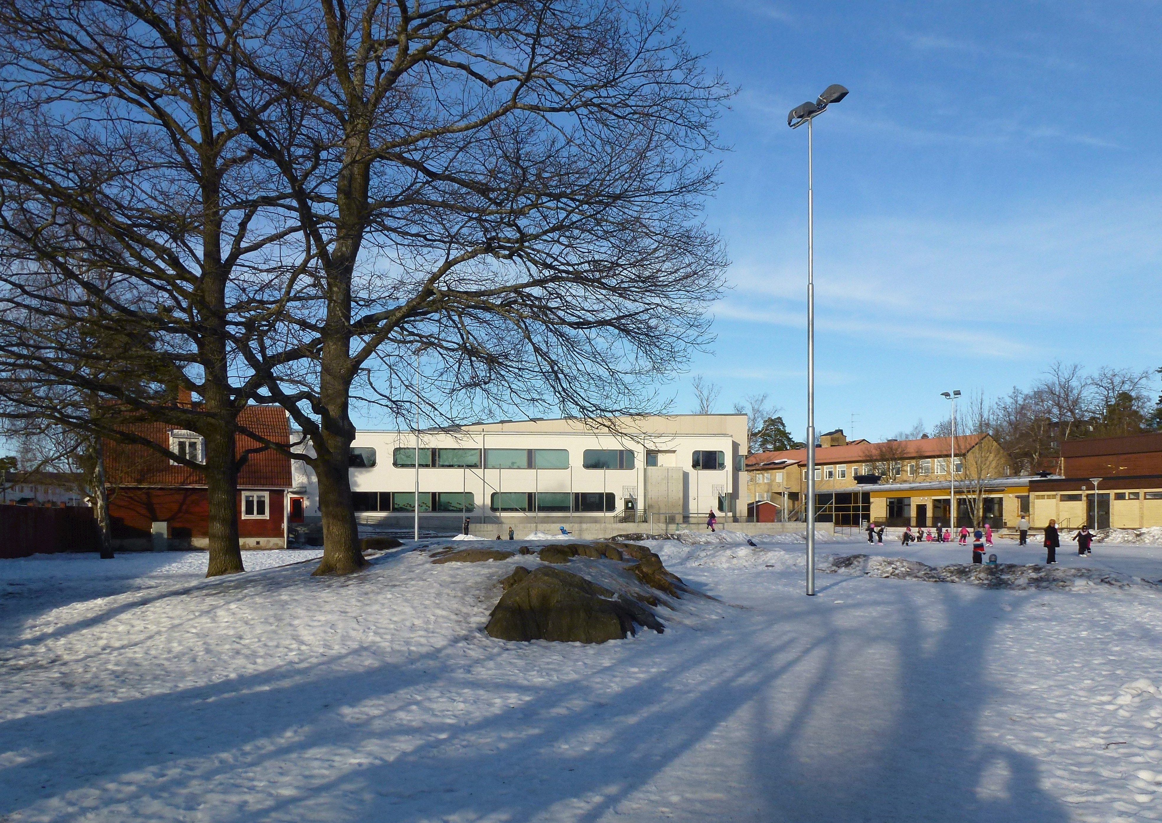 Segeltorpsskolan, vy mot norr. Längs till vänster syns den första förskolan (röda stugan), i mitten senaste utökning från 2010 och till höger de äldre byggnaderna från 1950- och 1970-talet.